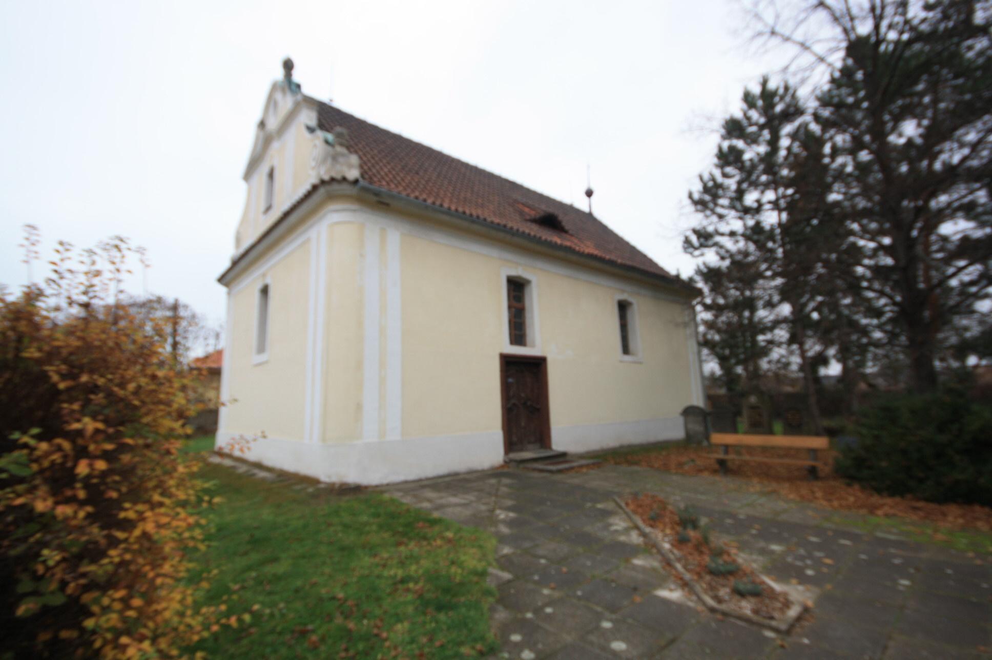 Toleranční kostel v Libiši (pohled od východu).